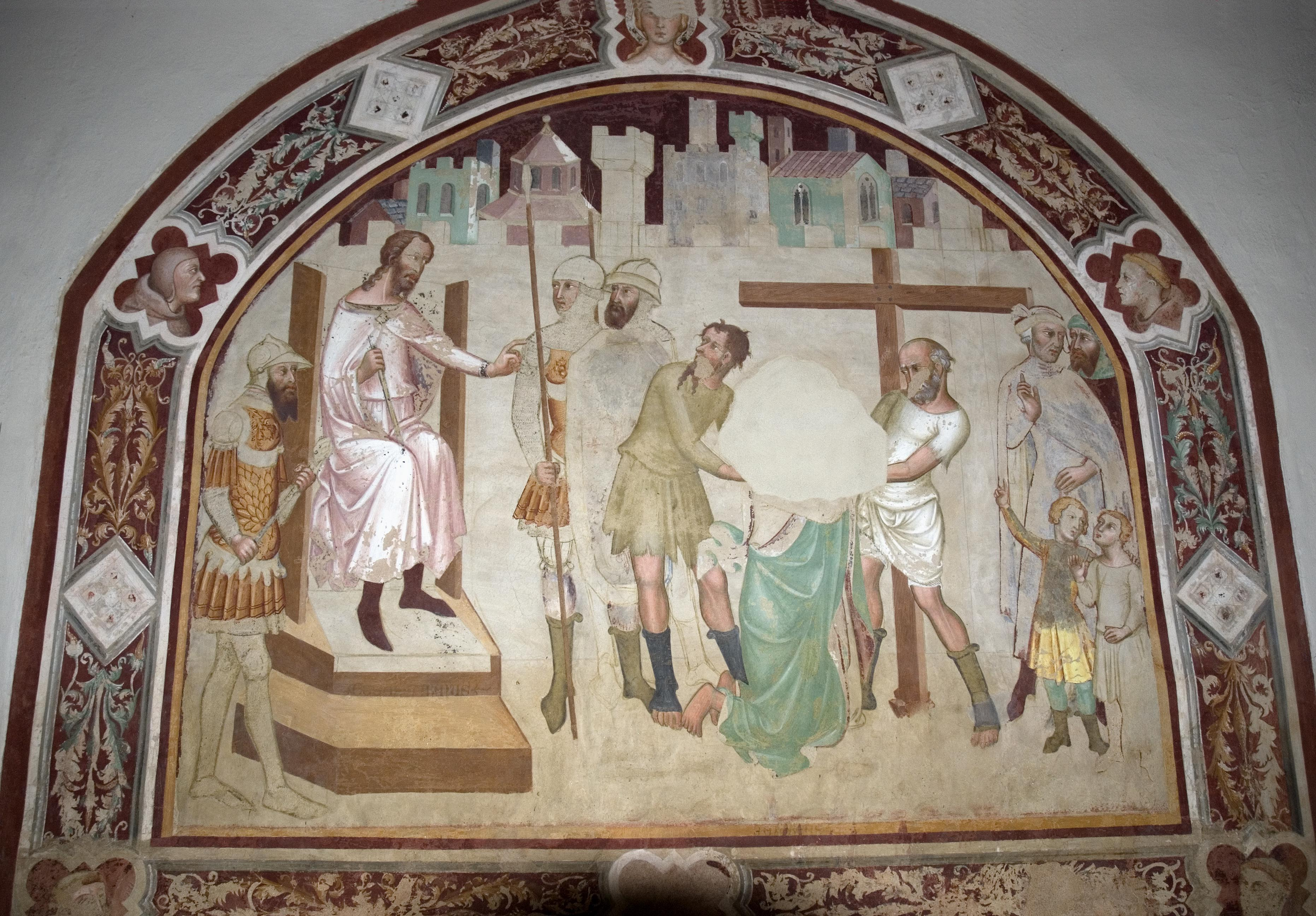 Affreschi della Chiesa di San Lucchese (Poggibonsi)